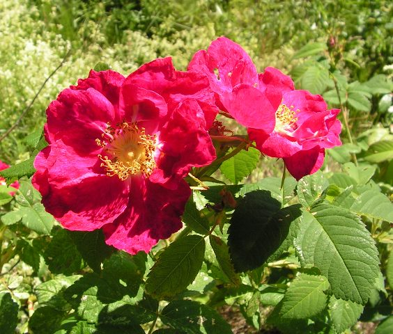 Rosa ×francofurtana 'Frankfurt'